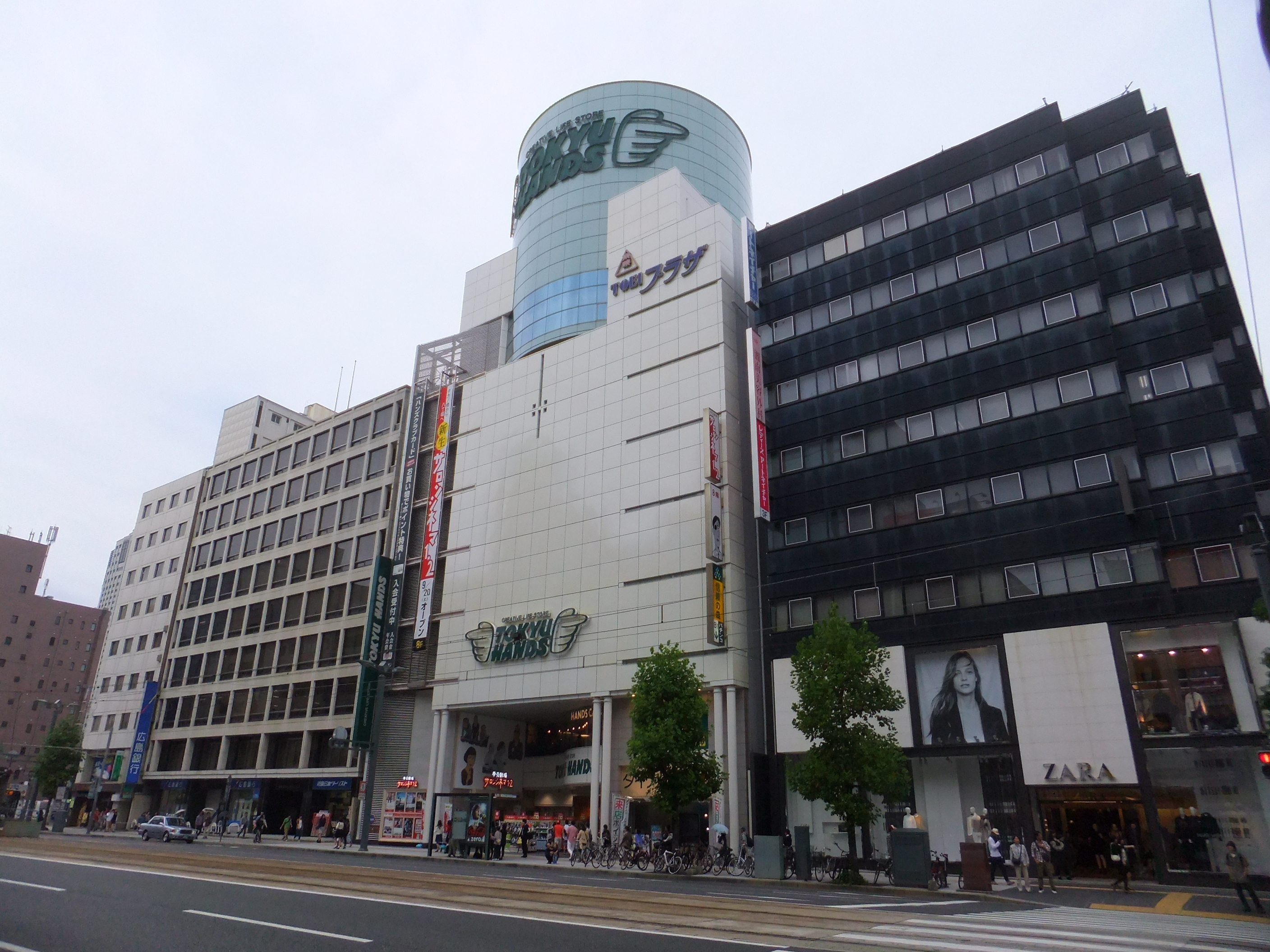 広島東映プラザ